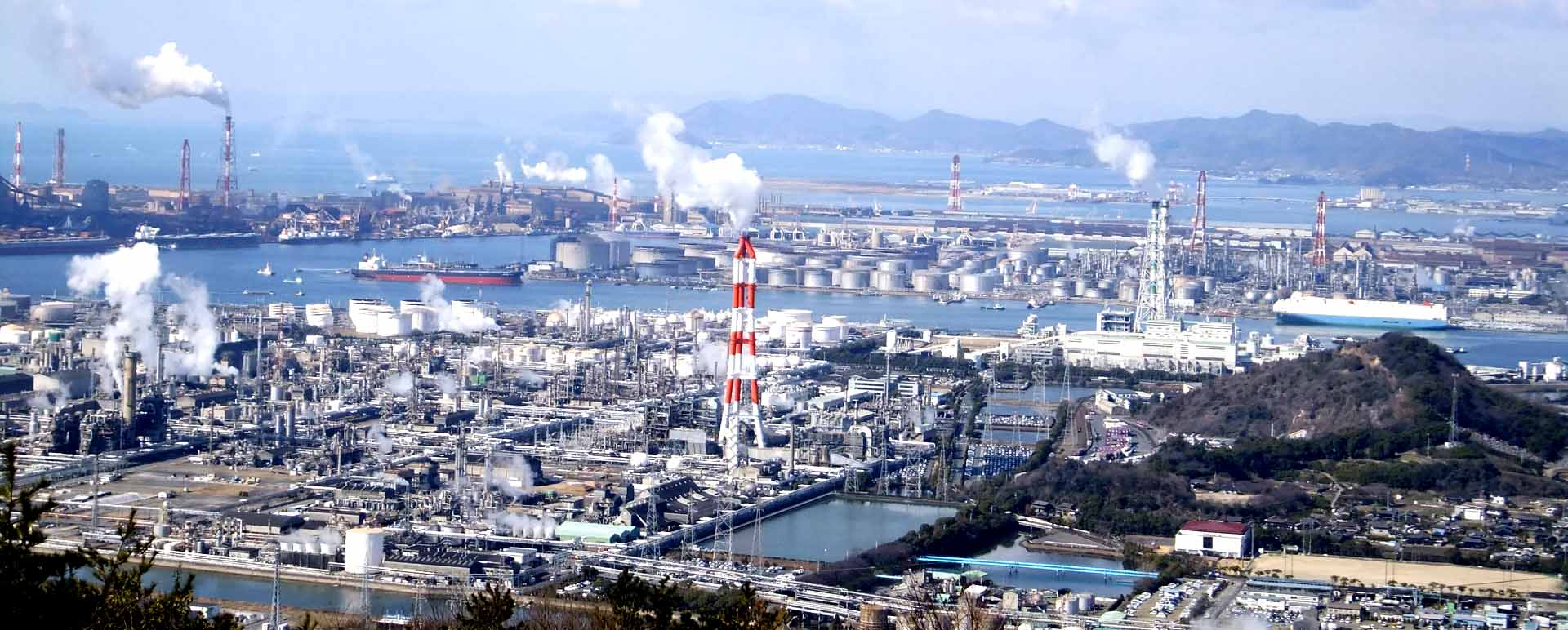 鷲羽山水島展望台から見た水島臨海工業地帯